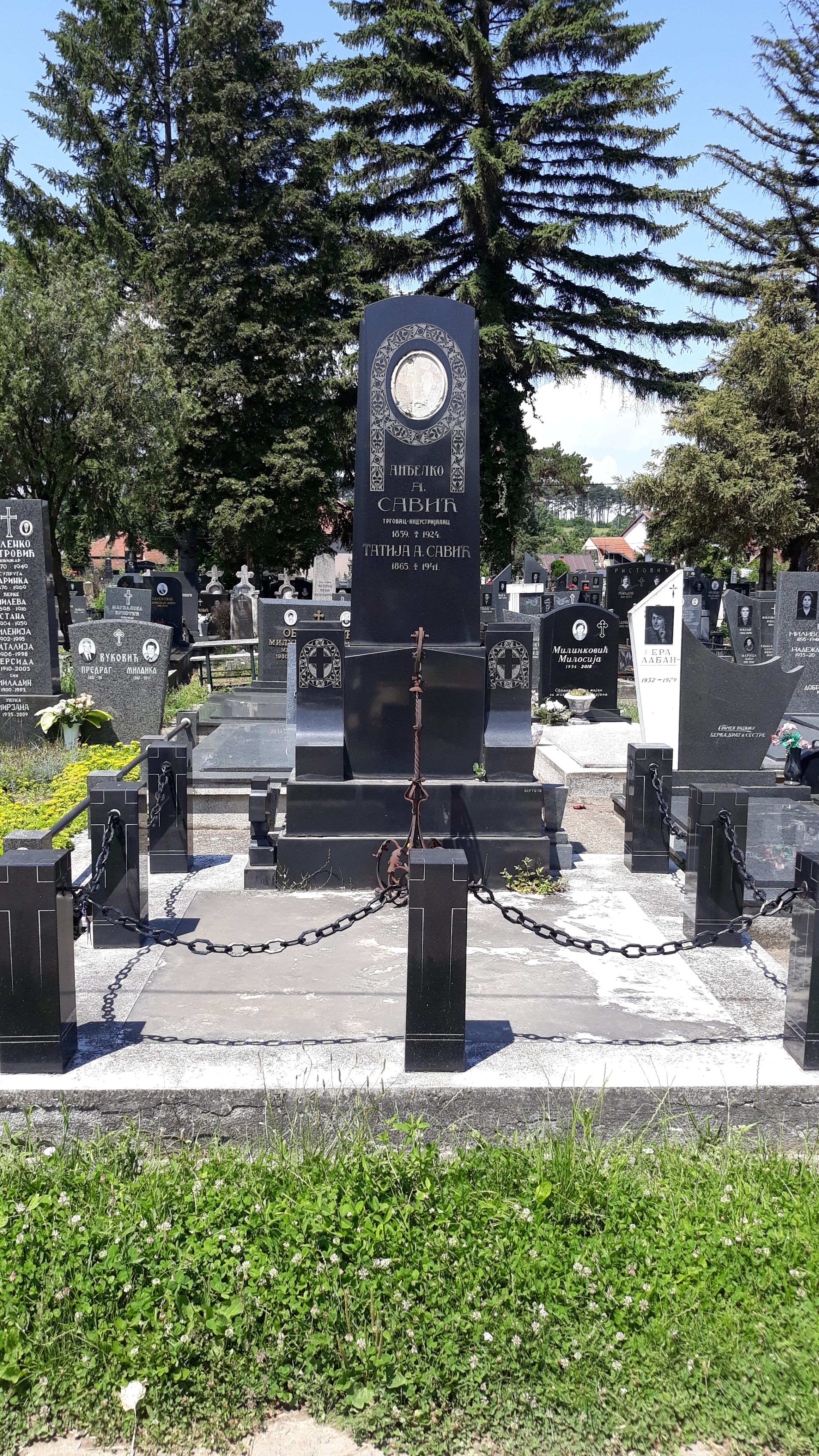 Породична гробница Анђелка Савића на Старом гробљу у Краљеву